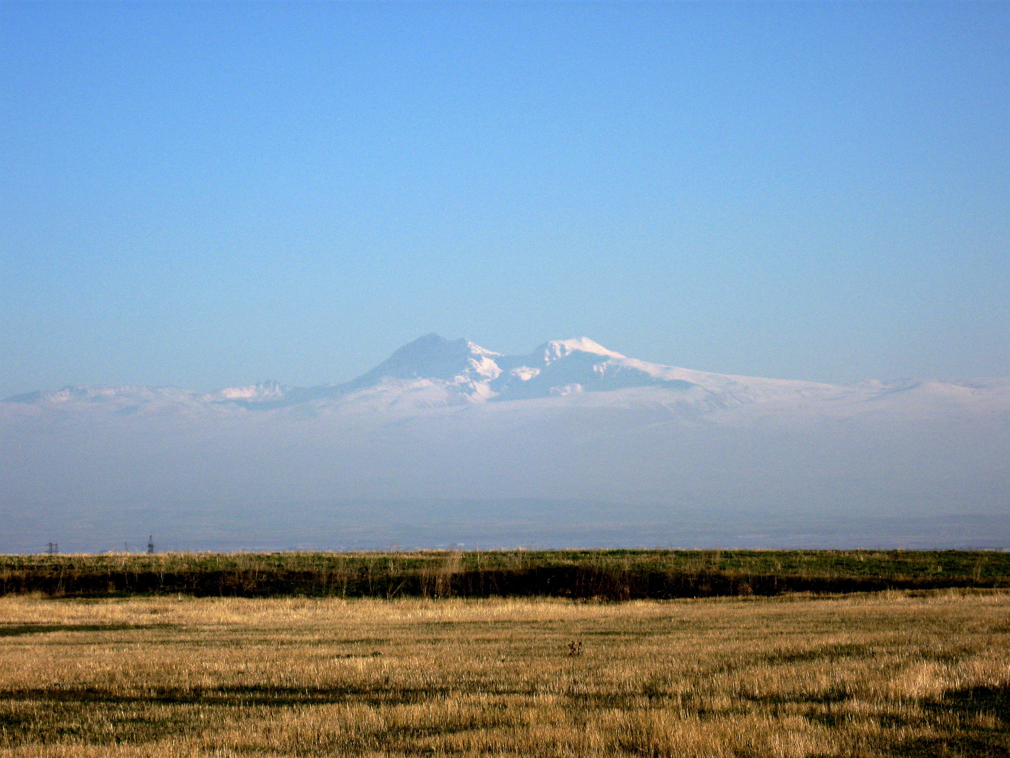 Մարմաշեն գյուղի տարածքից է նկարված...